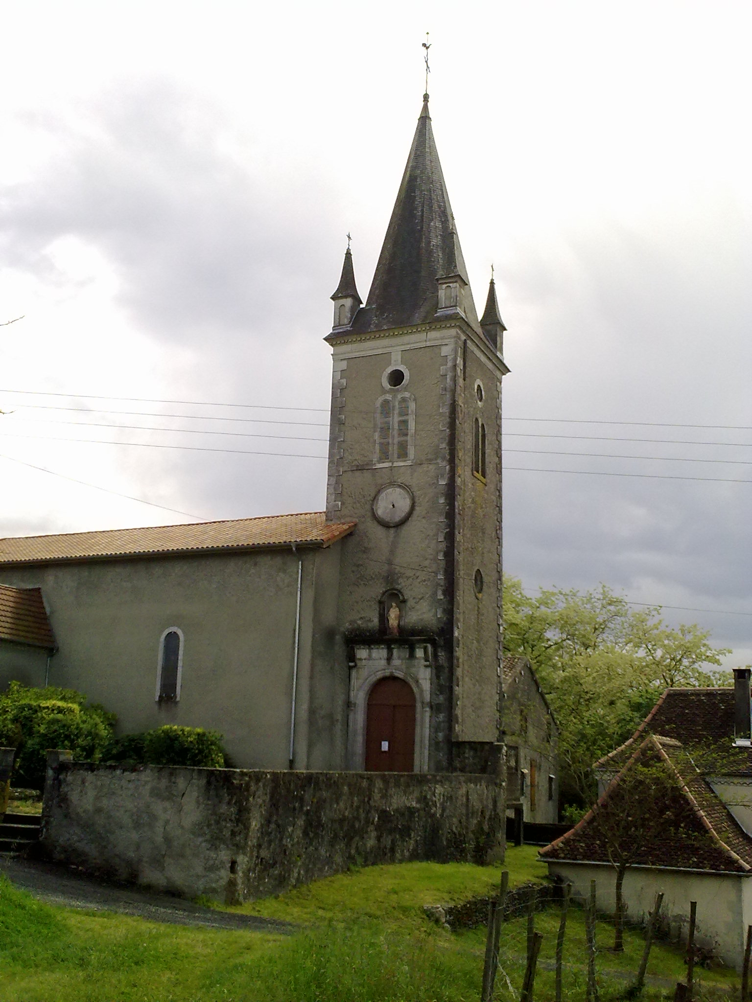 Ramous, France